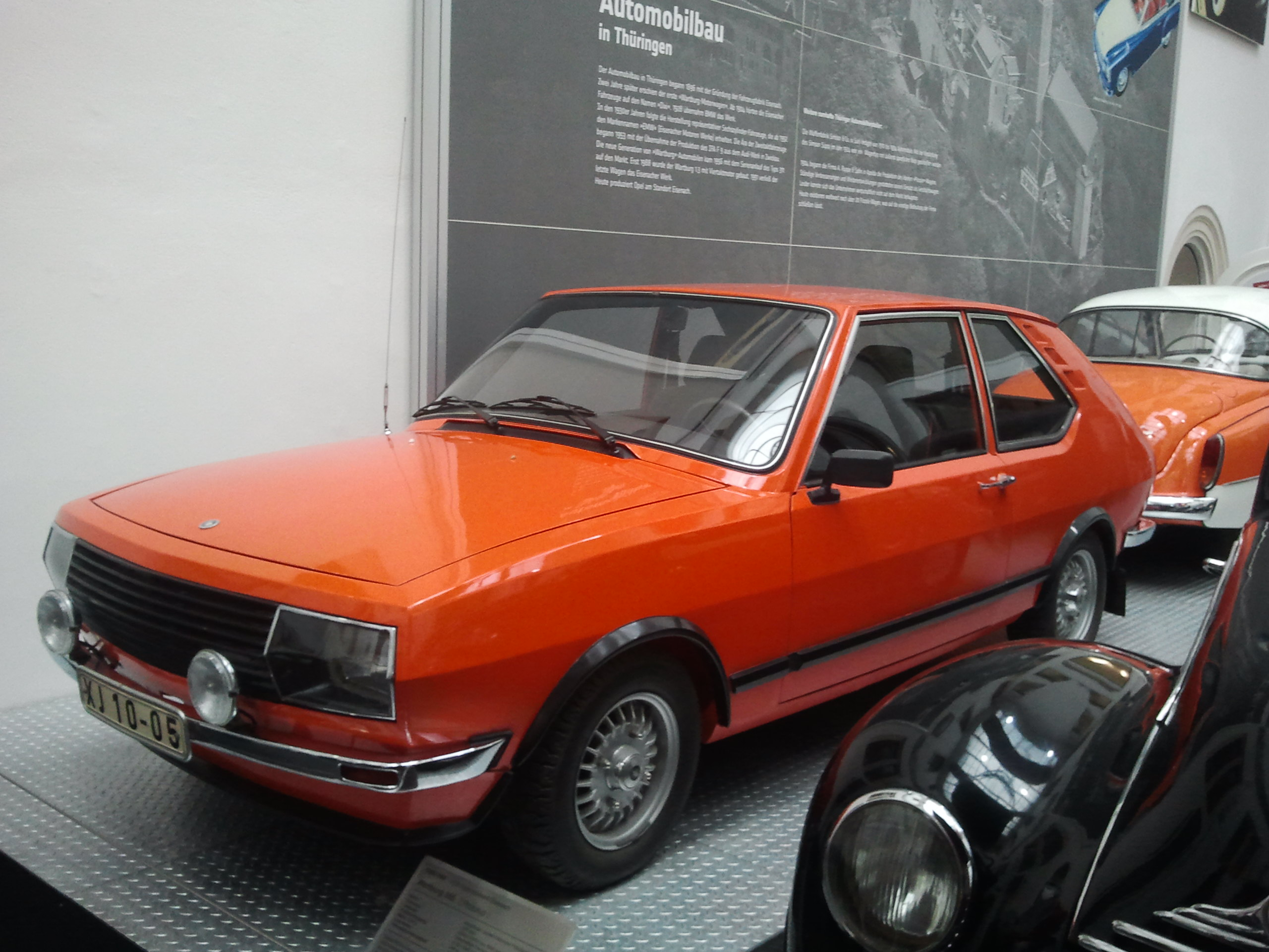 Wartburg 355 in Verkehrsmuseum Dresden